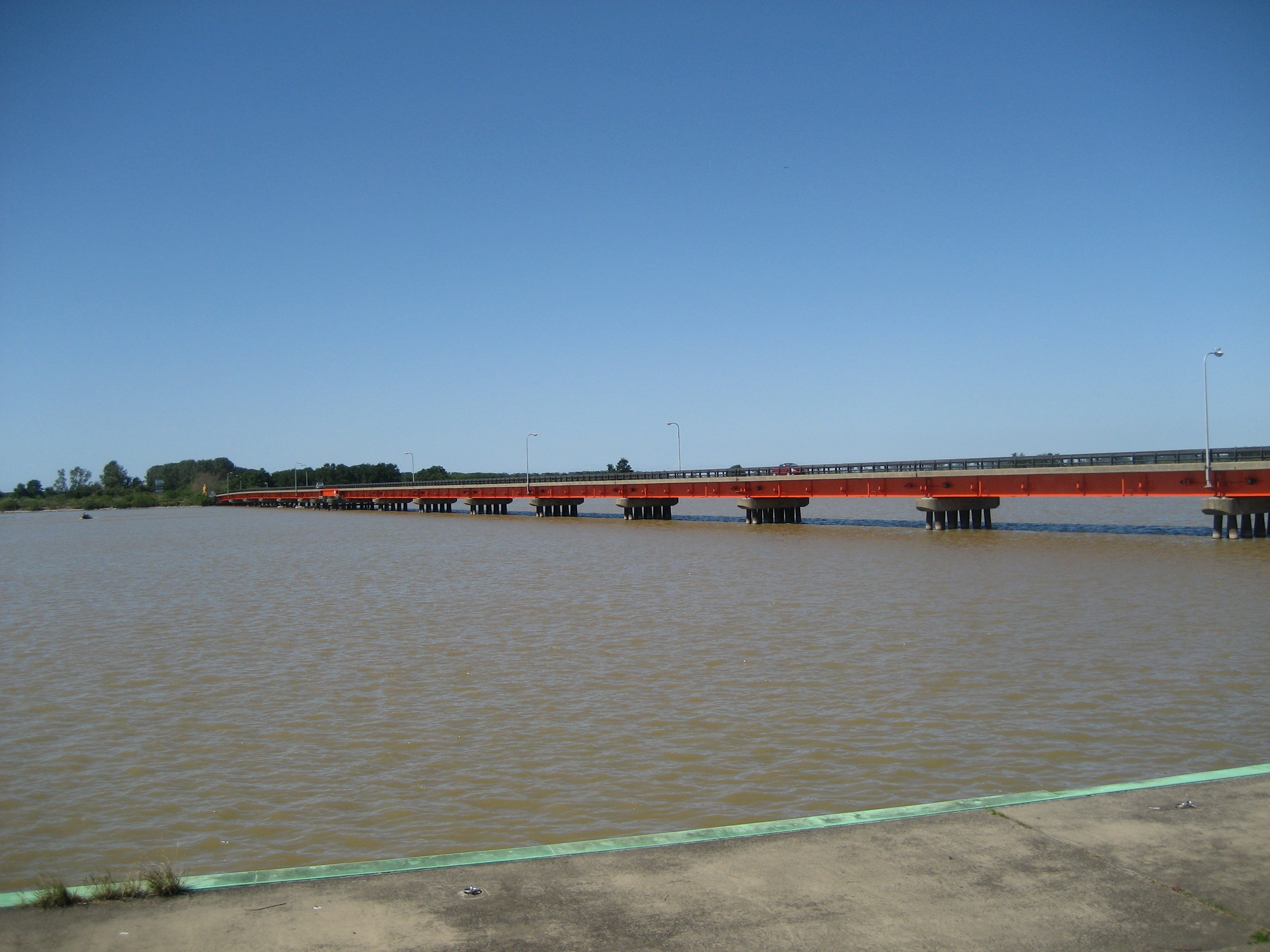 秋田県道298号線東部承水路に架かる大潟橋